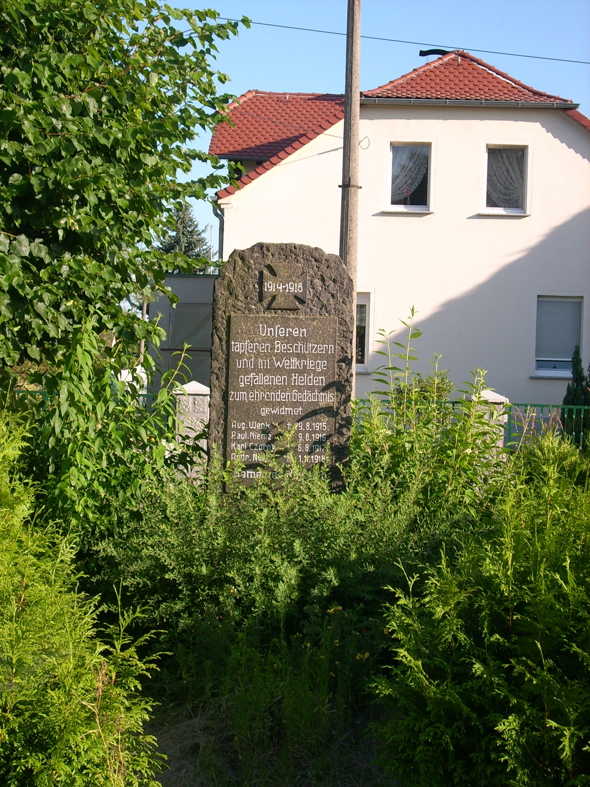 Denkmal für die Gefallenen des Ersten Weltkriegs in Koblenz, Ortsteil von Lohsa Hornjoserbsce: Pomnik padnjenym prěnjeje swětoweje wójny w Koblicach (gmejna Łaz)